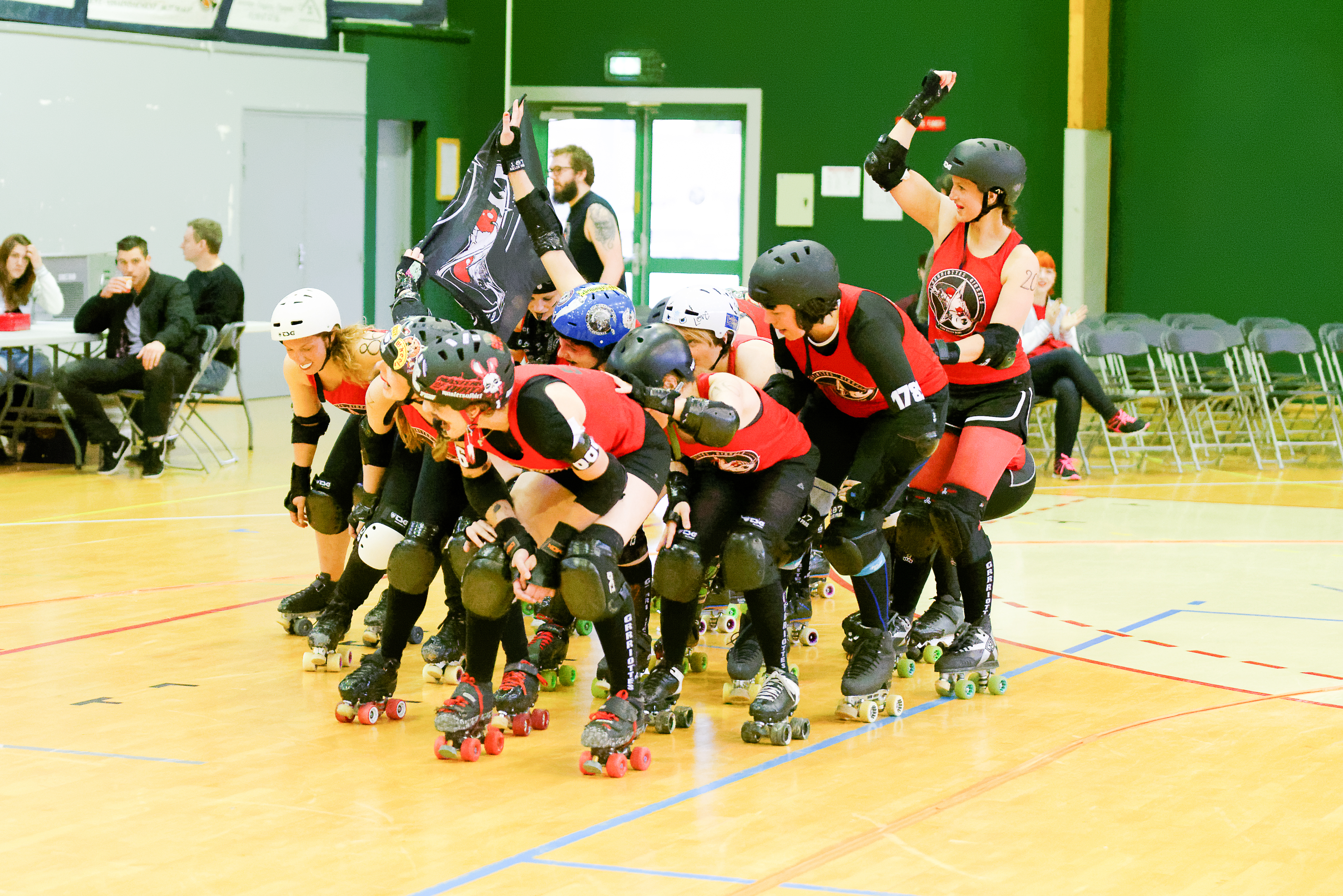 Championnat de France Roller Derby Nationale 2 Zone 5 Plateau 5. Rencontre Knee Breakers On Wheels / Roller Derby Belfort vs Les Grrriottes Girrrls / Lyon Roller Derby au gymnase Jean-Marc Boivin (Dijon, Côte d'Or, Bourgogne-Franche Comté, France).